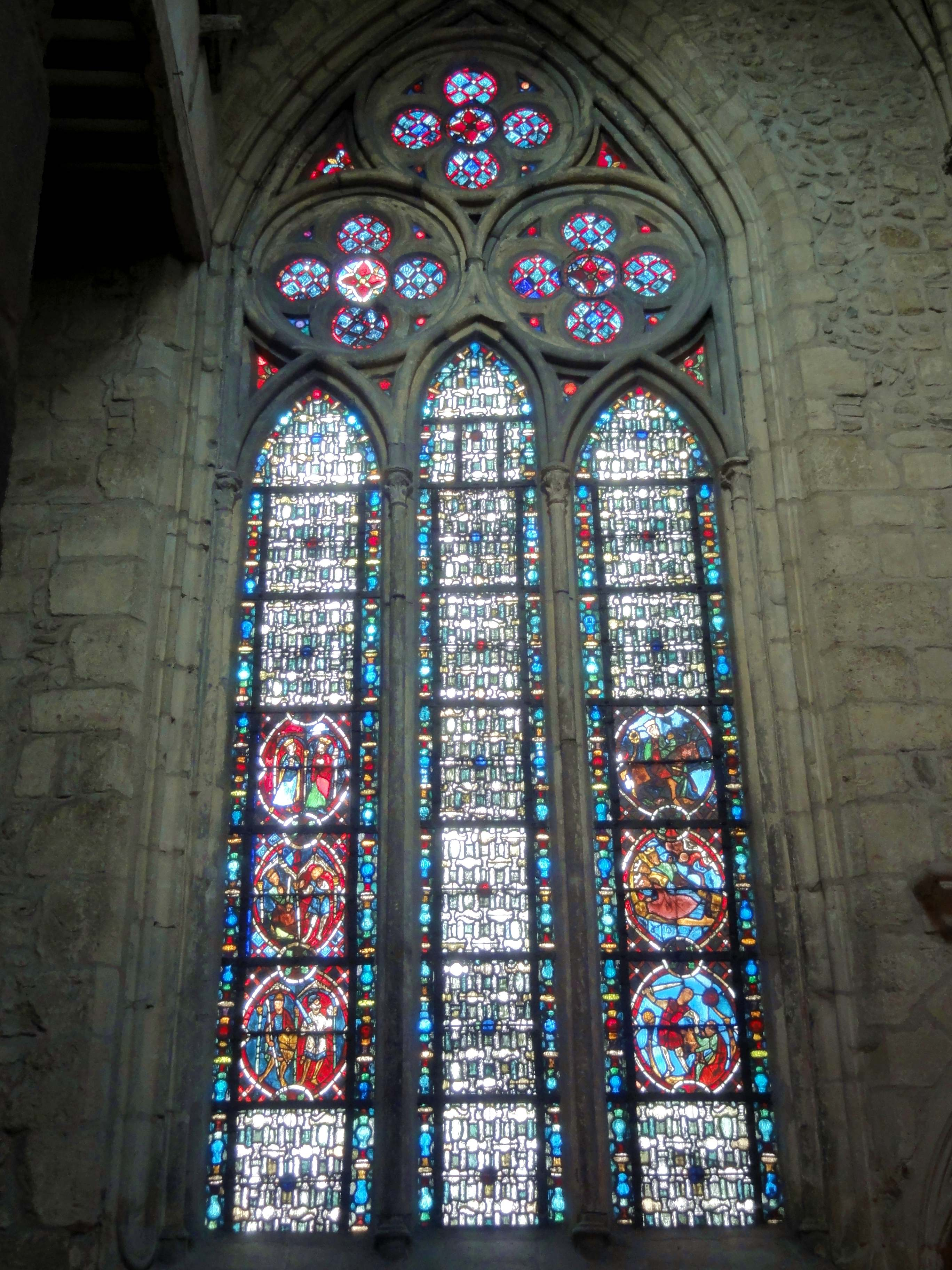 Croisillon nord, fenêtre orientale.